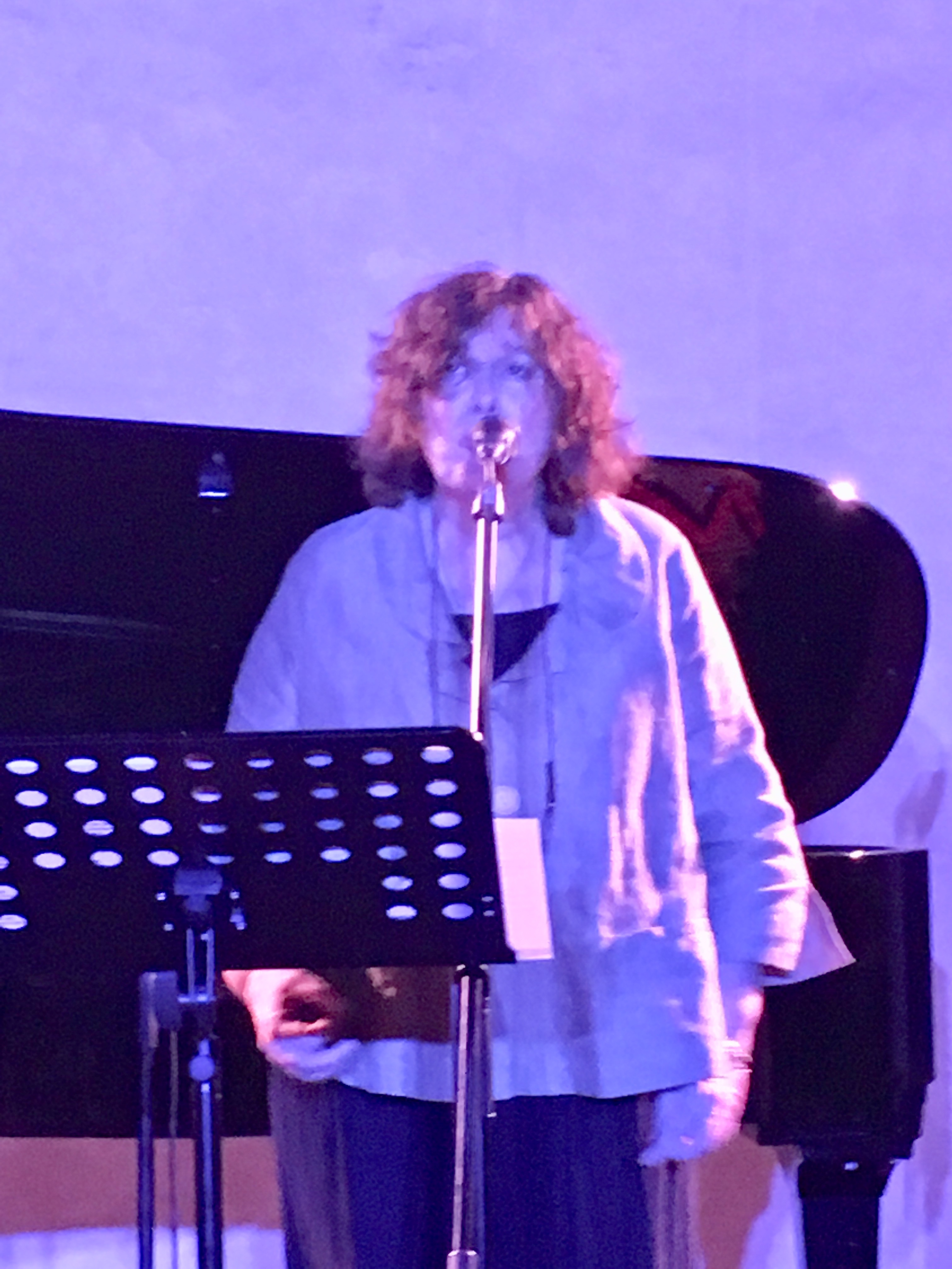 Tiziana Ghiglioni, Firenze settembre 2018